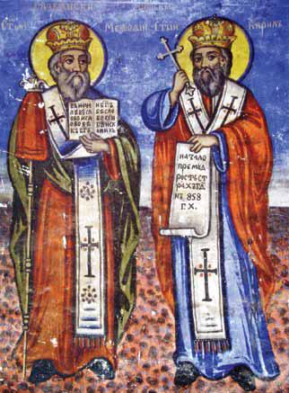 Манастир Слепче, црква Св. Јован Претеча, св. Кирил и св. Методија